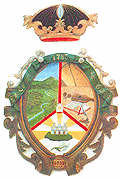 Escudo oficial del municipio San Casimiro, venezuela, Estado Aragua